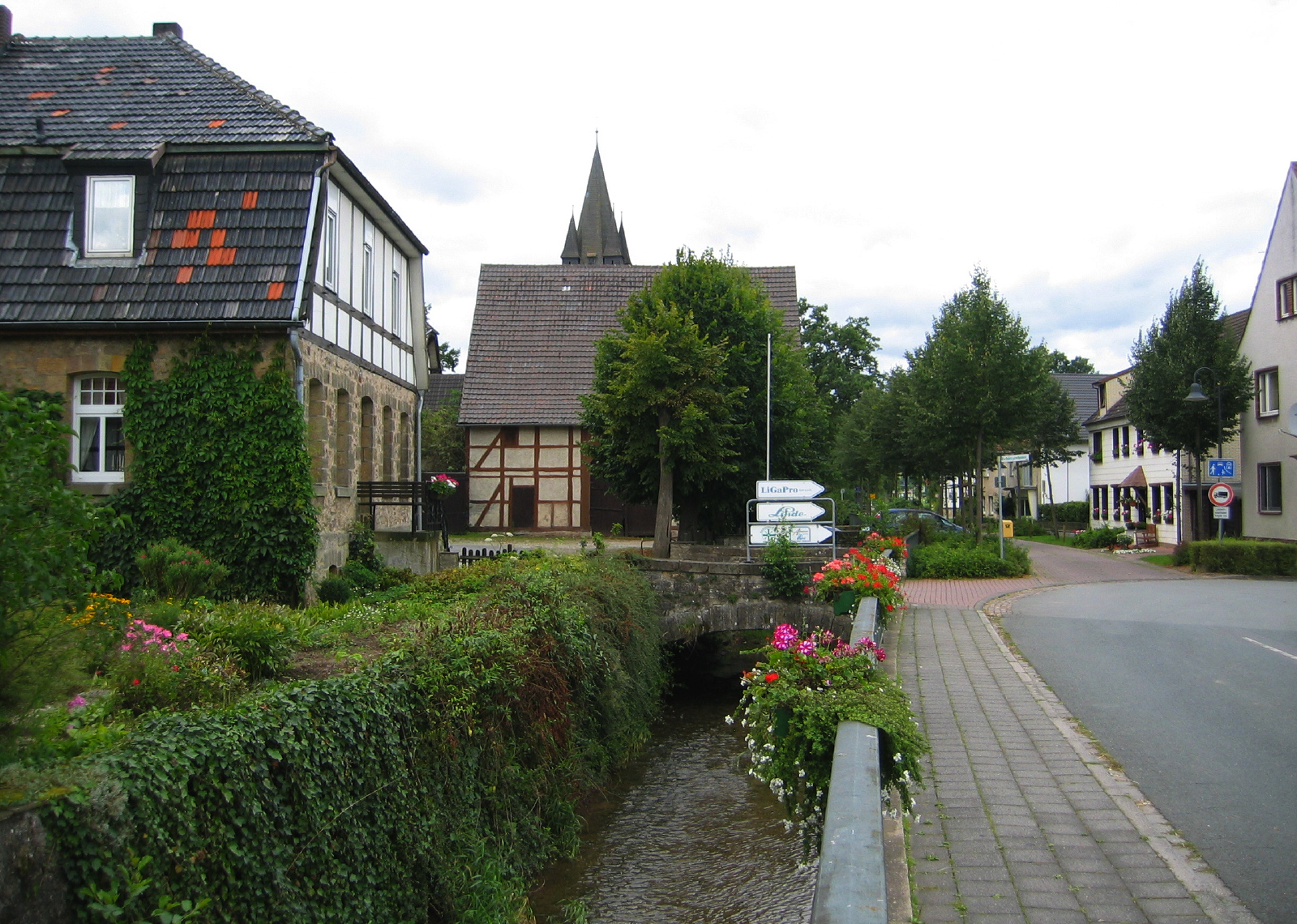 Der Katzbach fließt durch den Ortskern von Herste, Bad Driburg, Deutschland. Aufnahme an der Heristiestraße Ecke Rommenhöllerstraße, im Hintergrund der Turm der St.-Urbanus-Kirche.